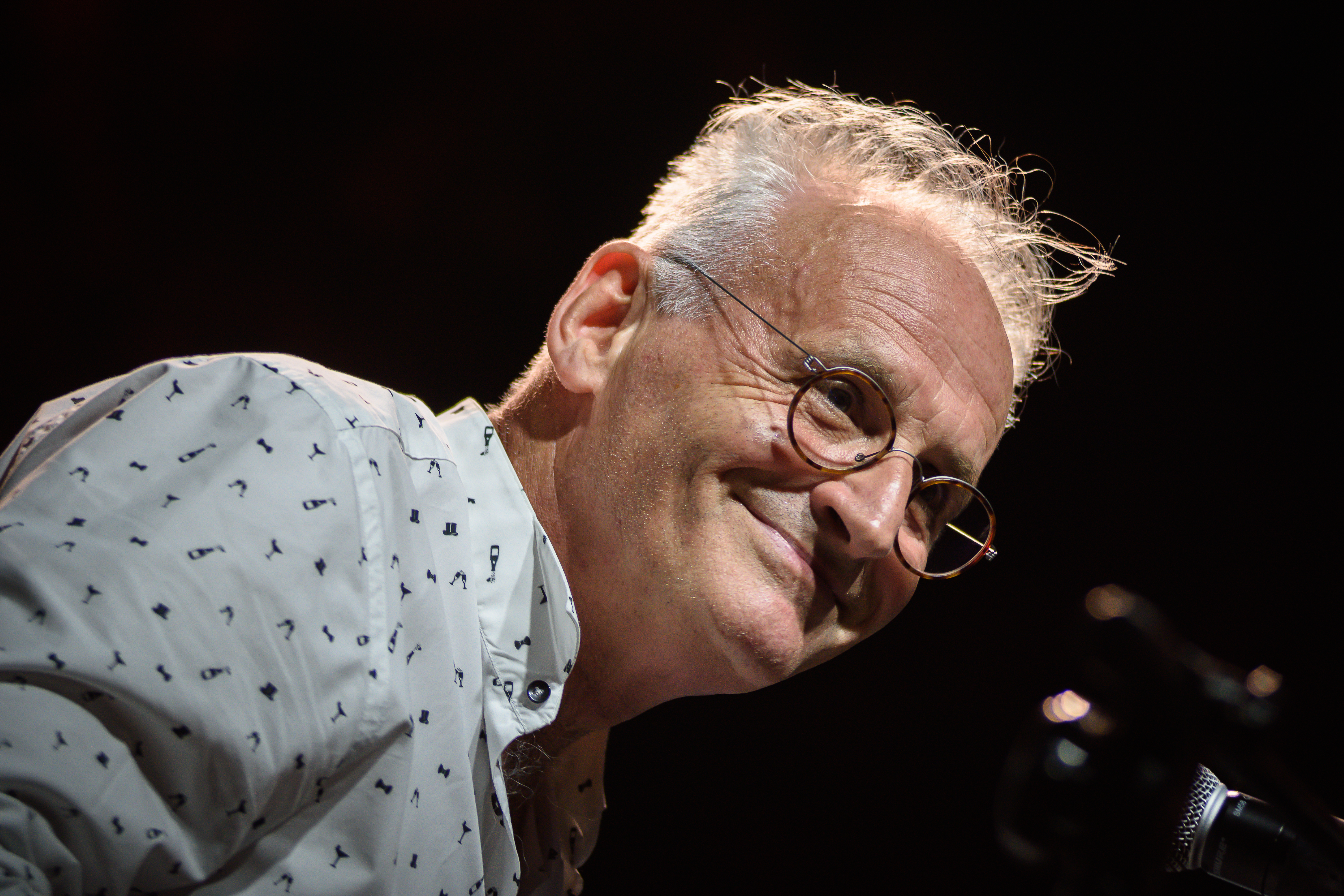 Krzesimir Dębski na koncercie w Pruszkowie (20.07.2019)